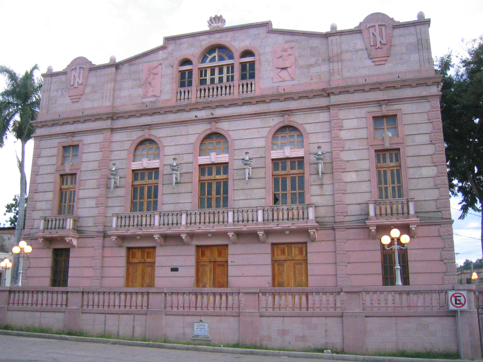 Teatro Nacional Manuel Bonilla in Tegulcigalpa, Honduras